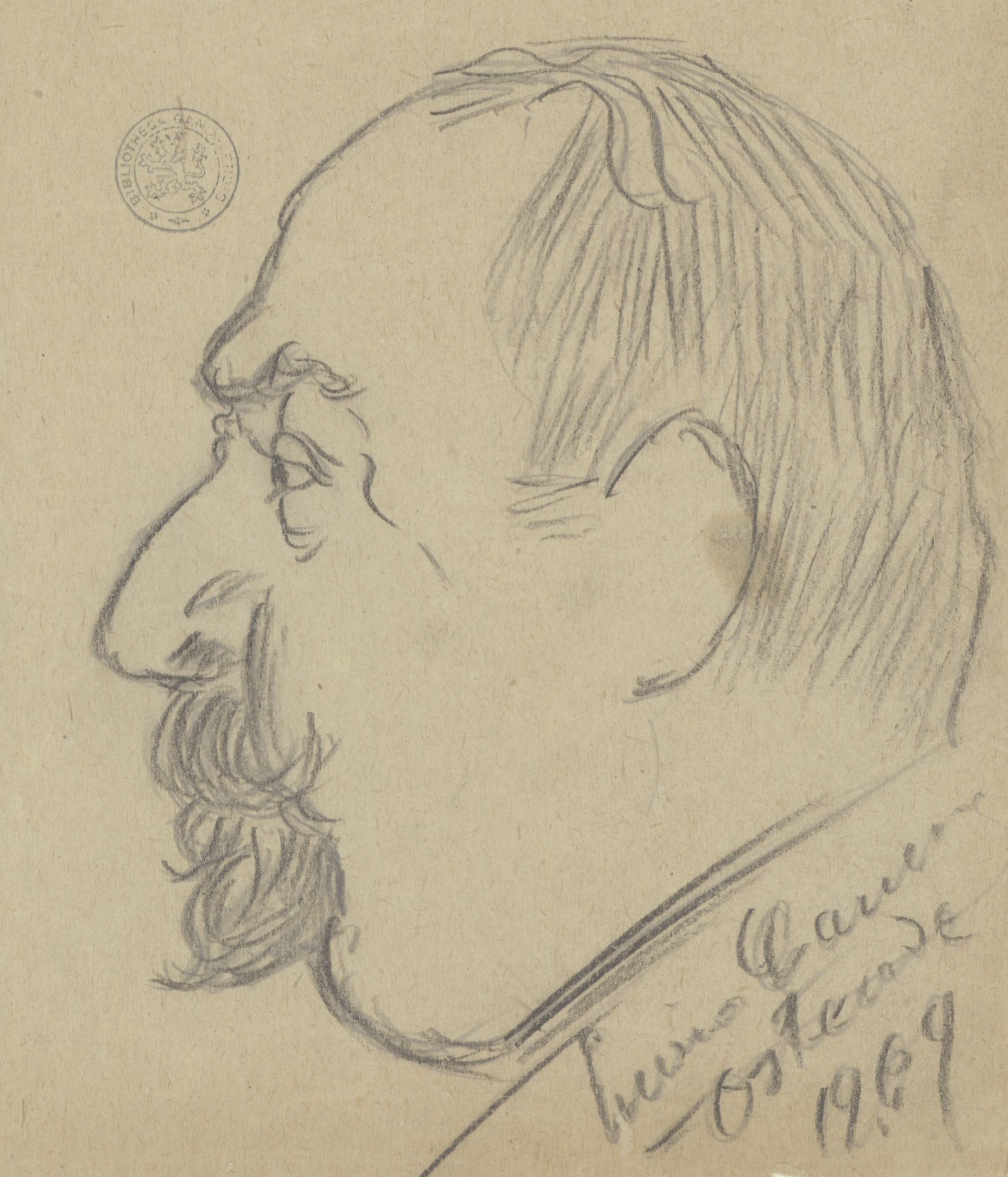 Portret van August Liebaert(1856-1927), burgemeester van Oostende (1912-1919) uit[verzamelband] karikaturen getekend door Enrico Caruso (1906 & 1909, Universiteitsbibliotheek Gent)